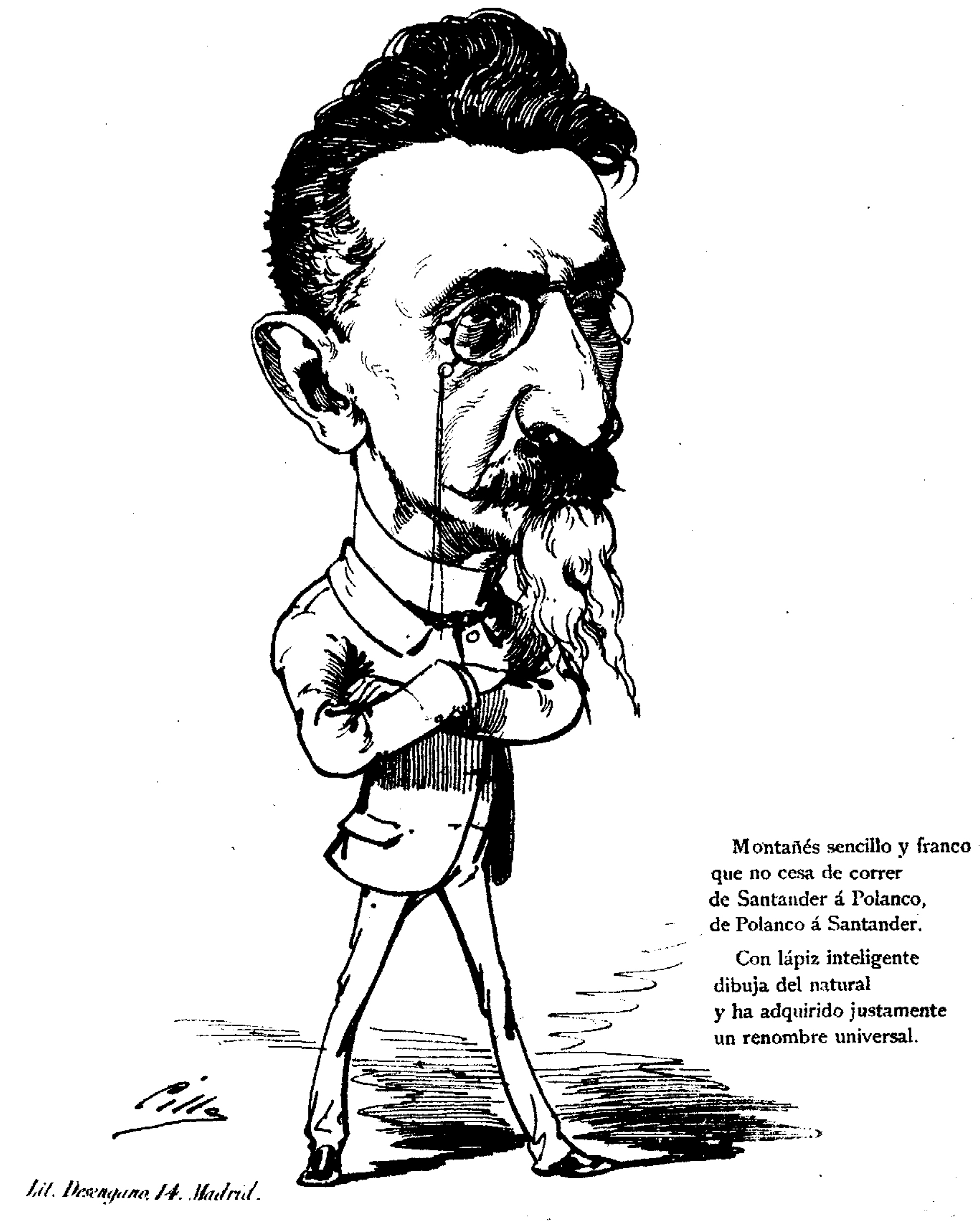 Madrid Cómico, 1 de abril de 1883.